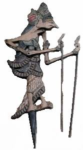 Dewi Suhita aus den Damarwulan-Erzählungen, Wayang Klitik aus Ostjava, ca. 1995.